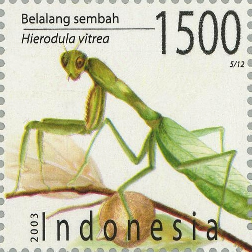 Hierodula venosa (vitrea)